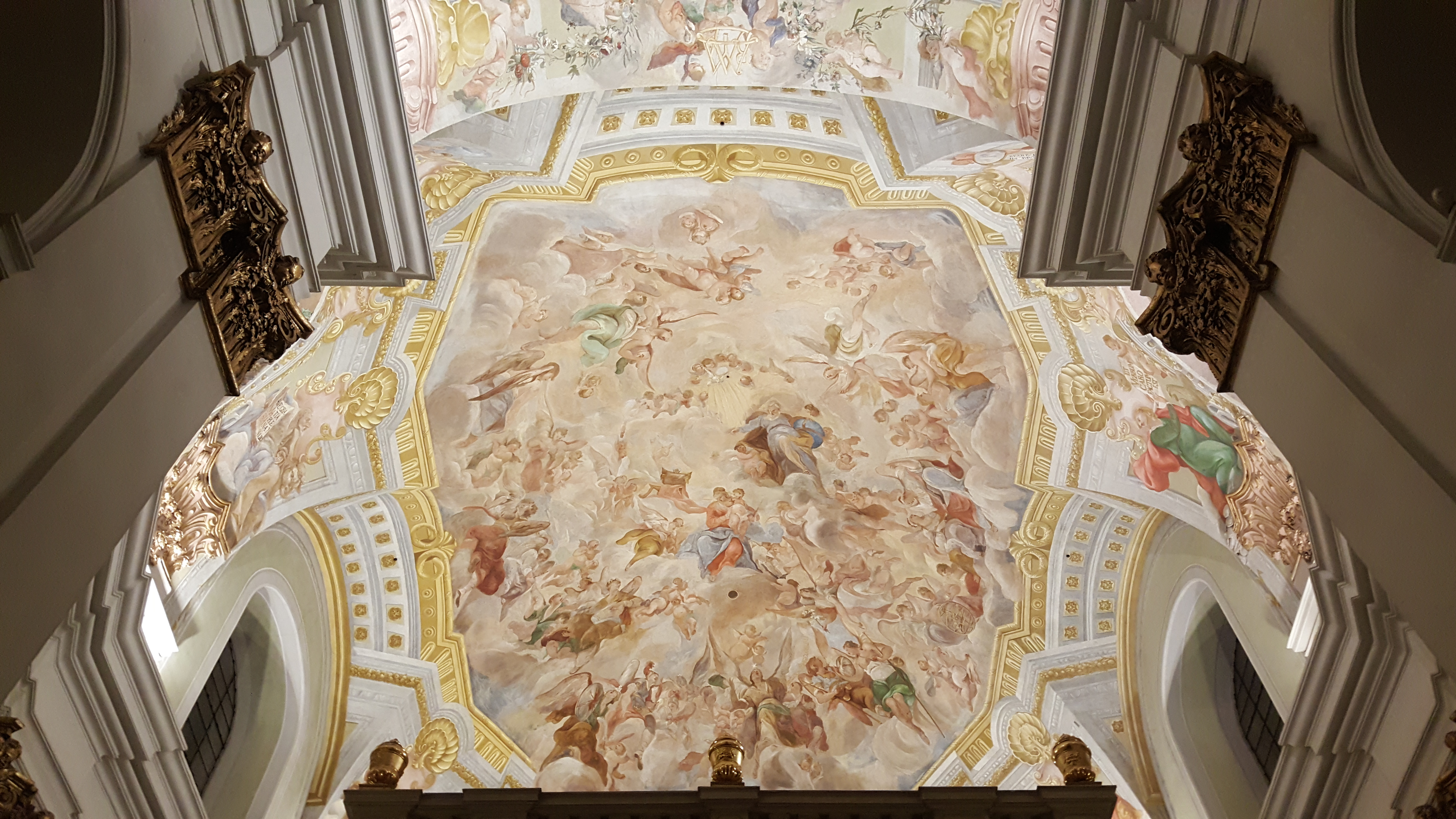 Freska Oslava Panny Marie, loretánská kaple při klášteře minoritů v Brně (1725)